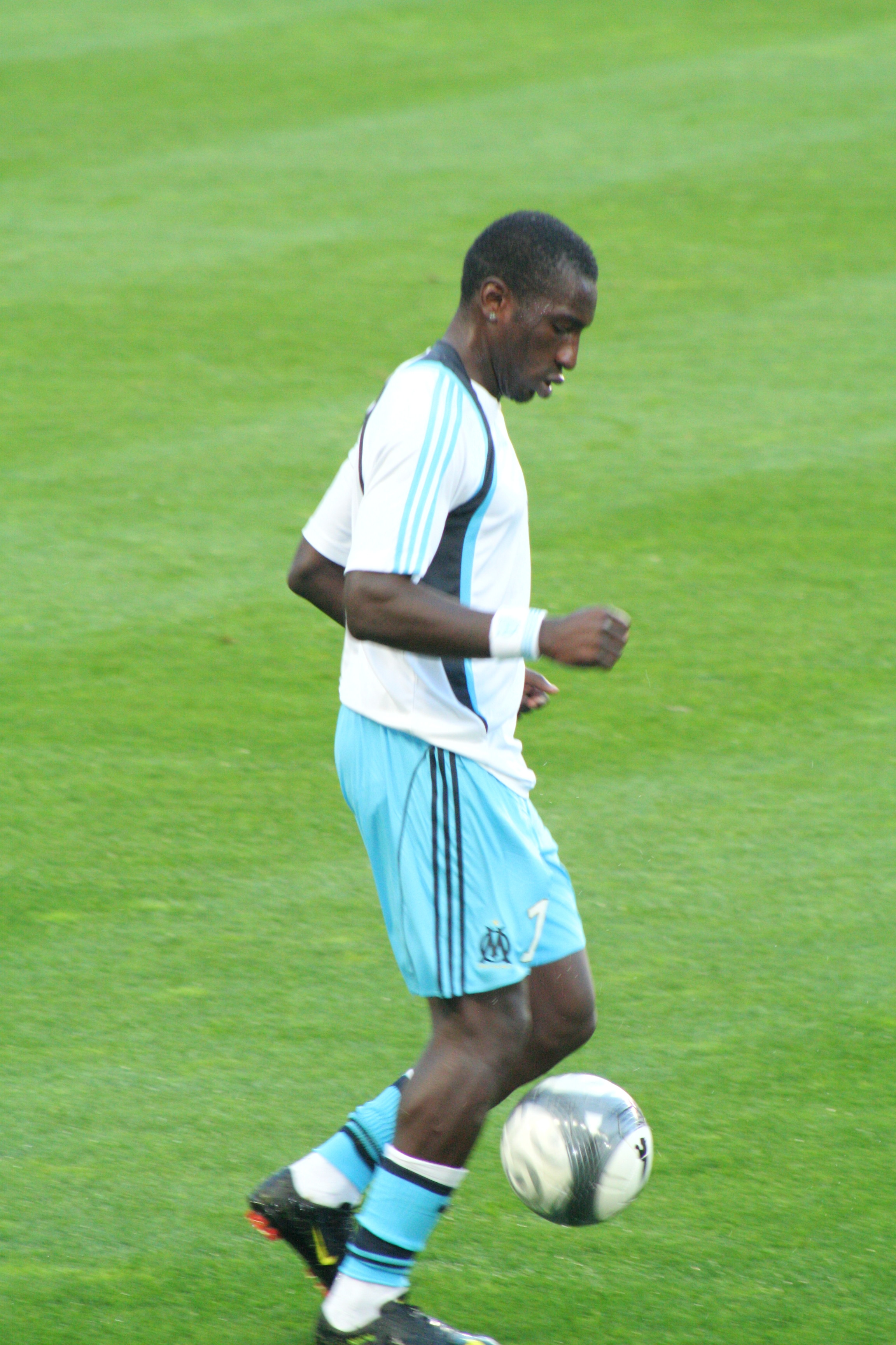 mamadou niang à l'echauffement avant le match rennes-marseille le 22/08/2009